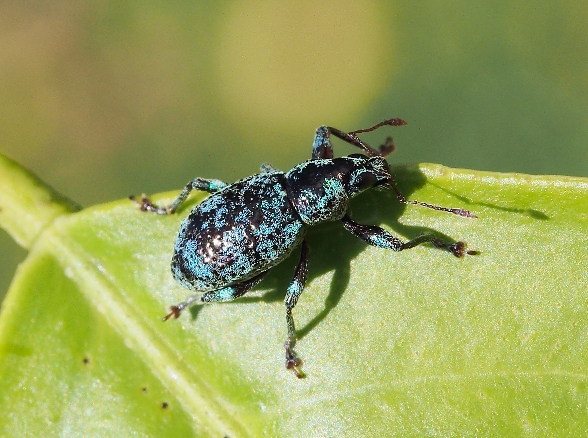 Photographie in vivo de Cratopopsis alluaudi Hustache, 1921 (forme bleue) (Coleoptera, Curculionidae). Espèce endémique de l'île de La Réunion